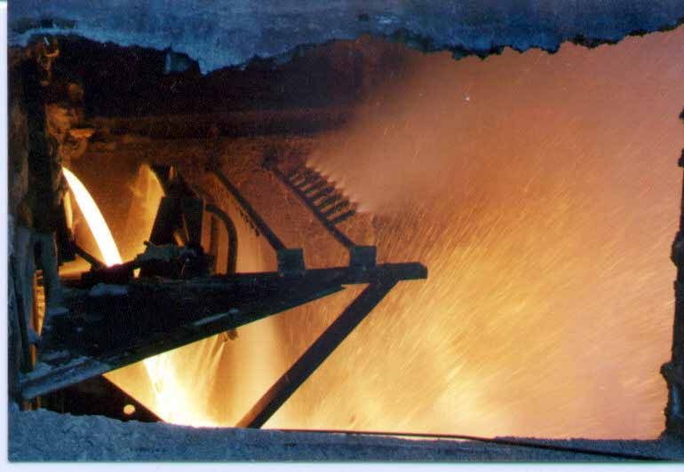 Vue du laitier tombant sur la machine